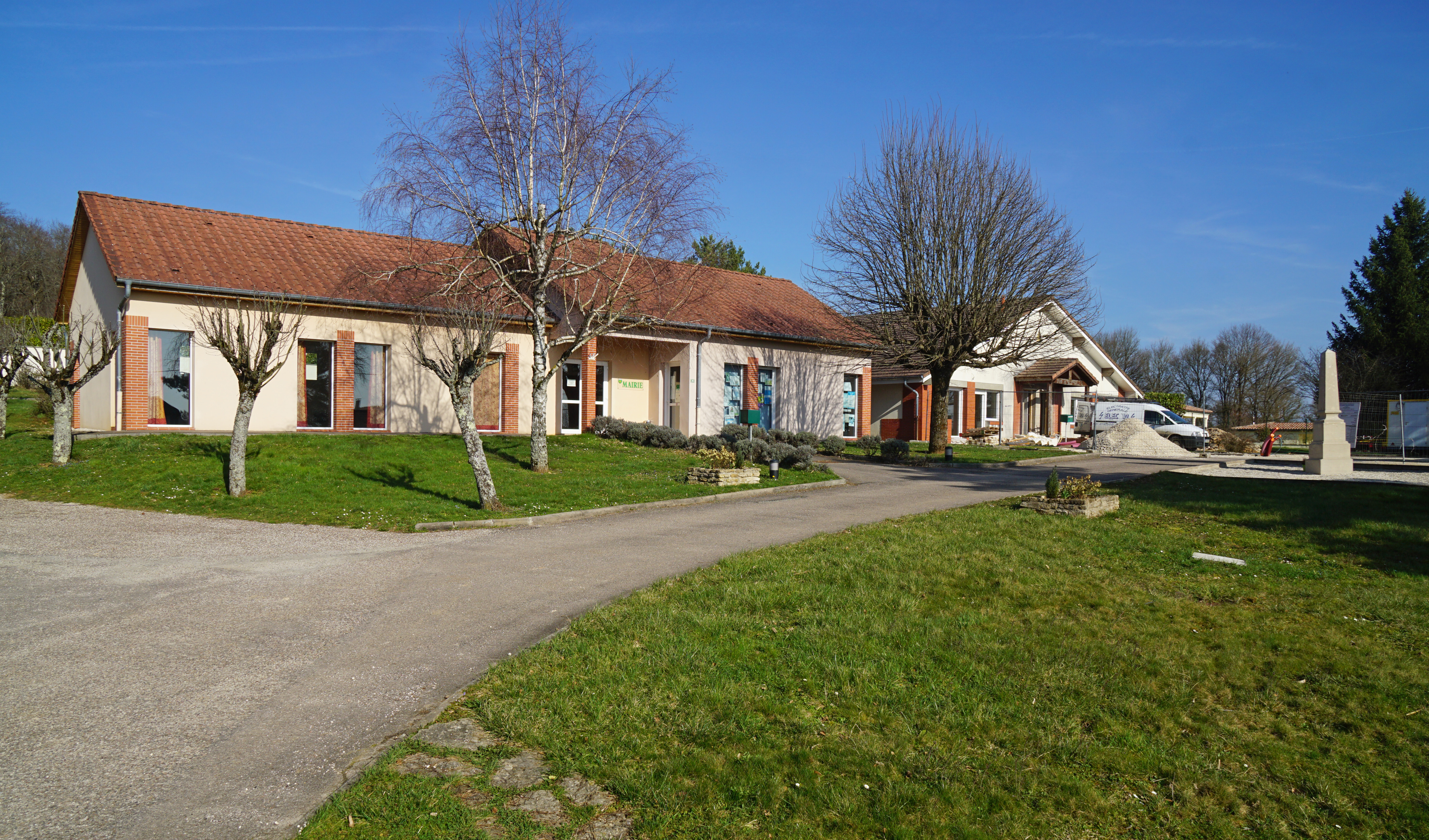 La mairie, l'ancienne école et le monument aux morts de Vallerois-Lorioz.